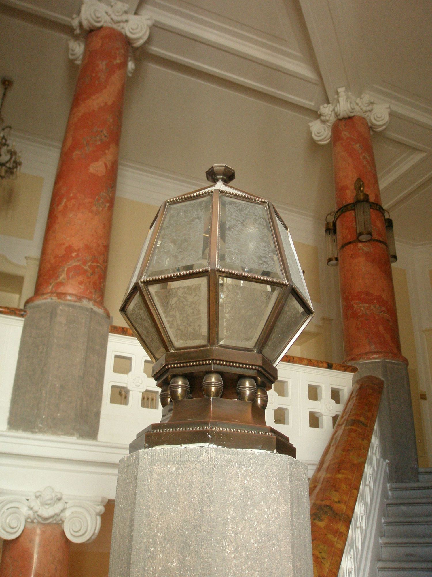 Radnice Slezske Ostravy